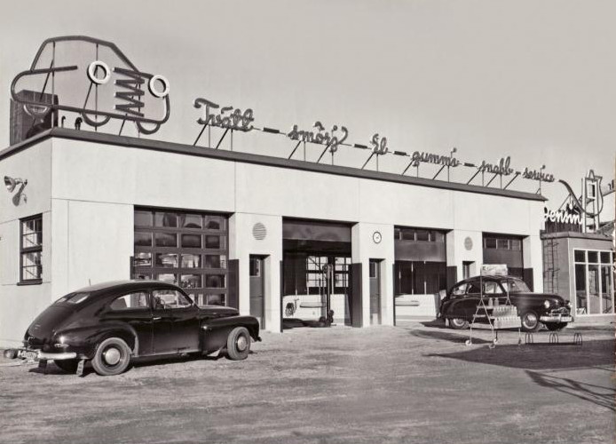 IC bensinstation vid Brommaplan med Morneons ljusreklam